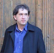 Joan-Lluís Lluís